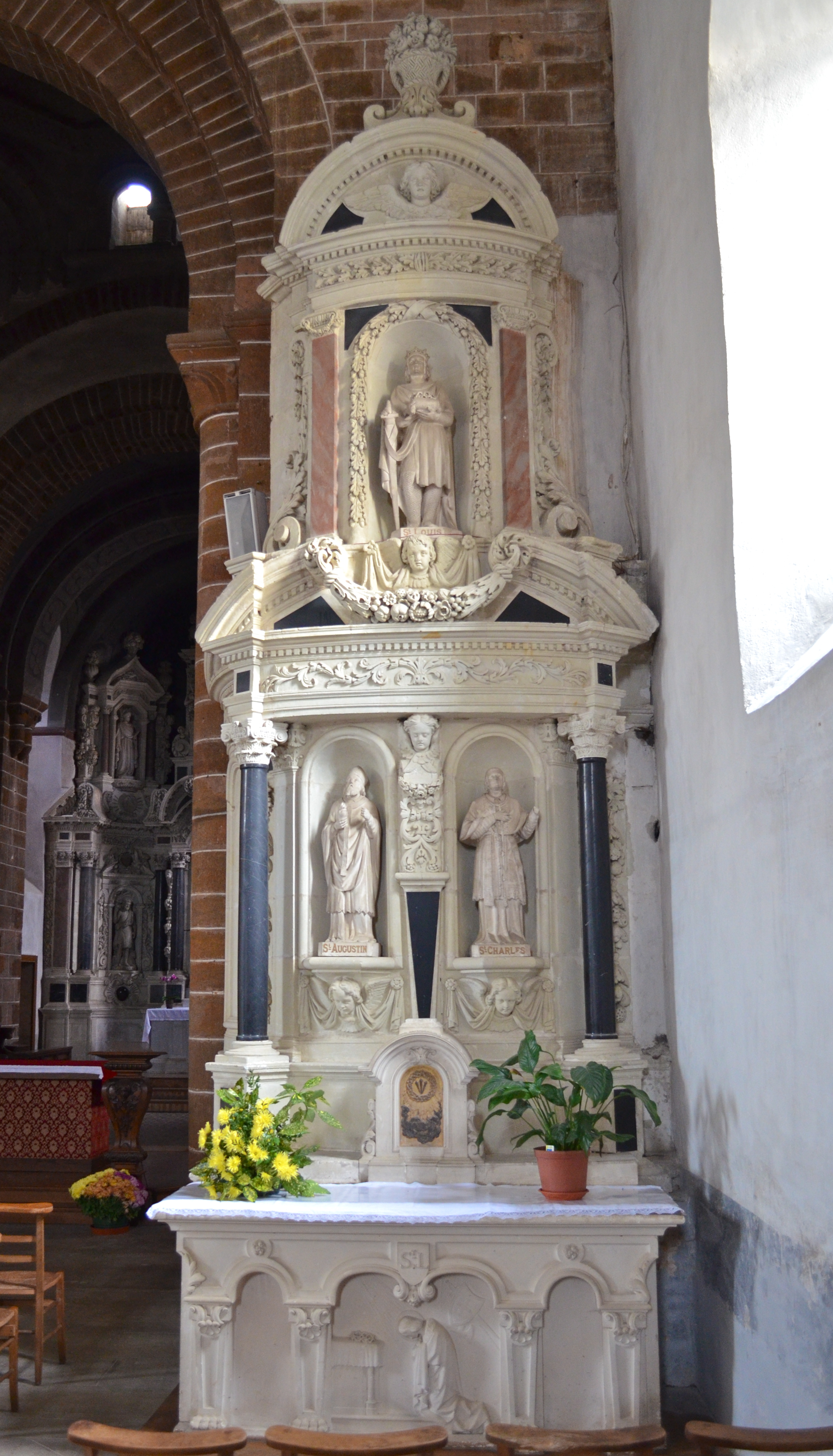 Eglise Saint-Jean de Béré - Châteaubriant (Loire-Atlantique)